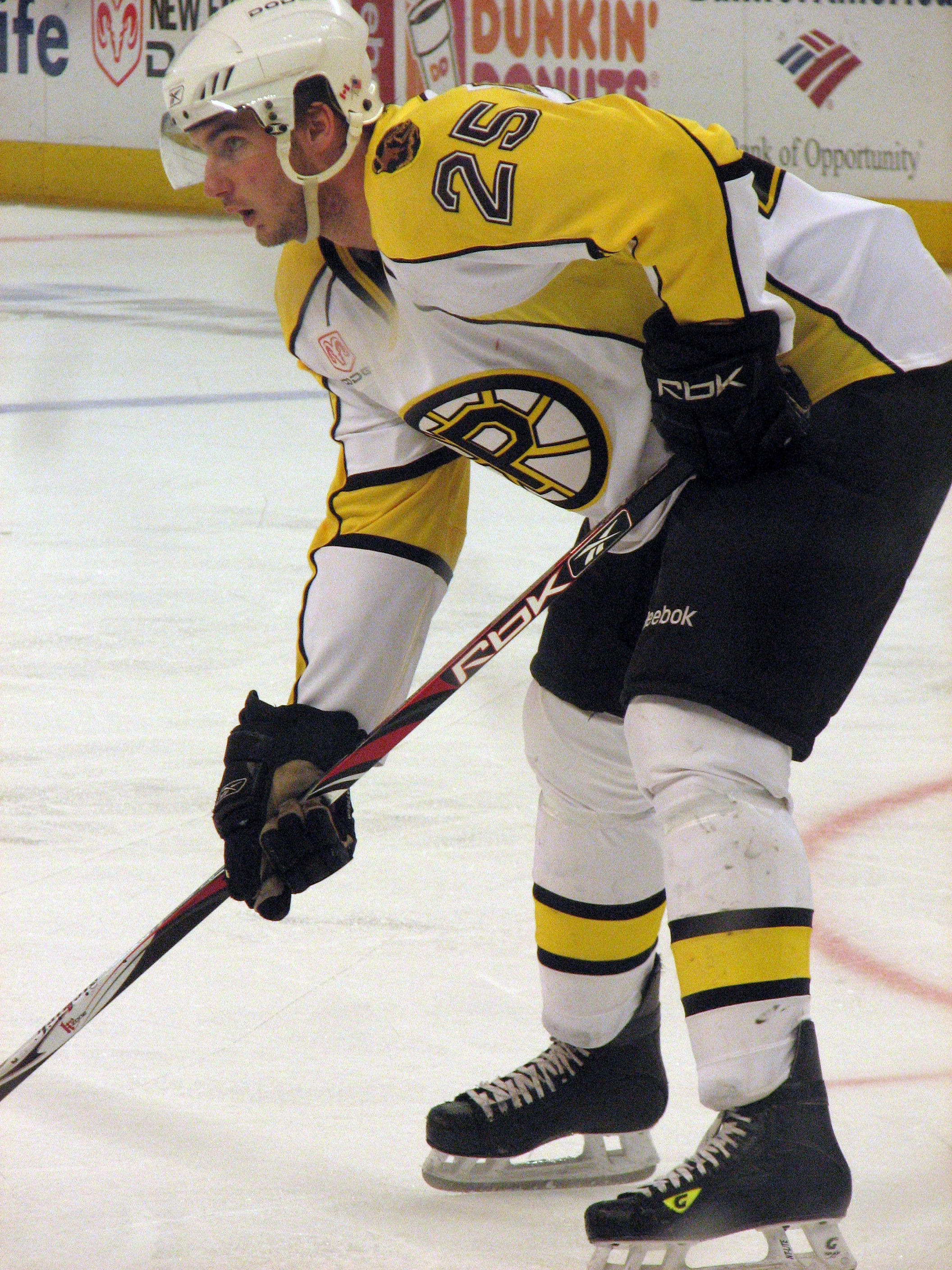 Nov 7, 2008